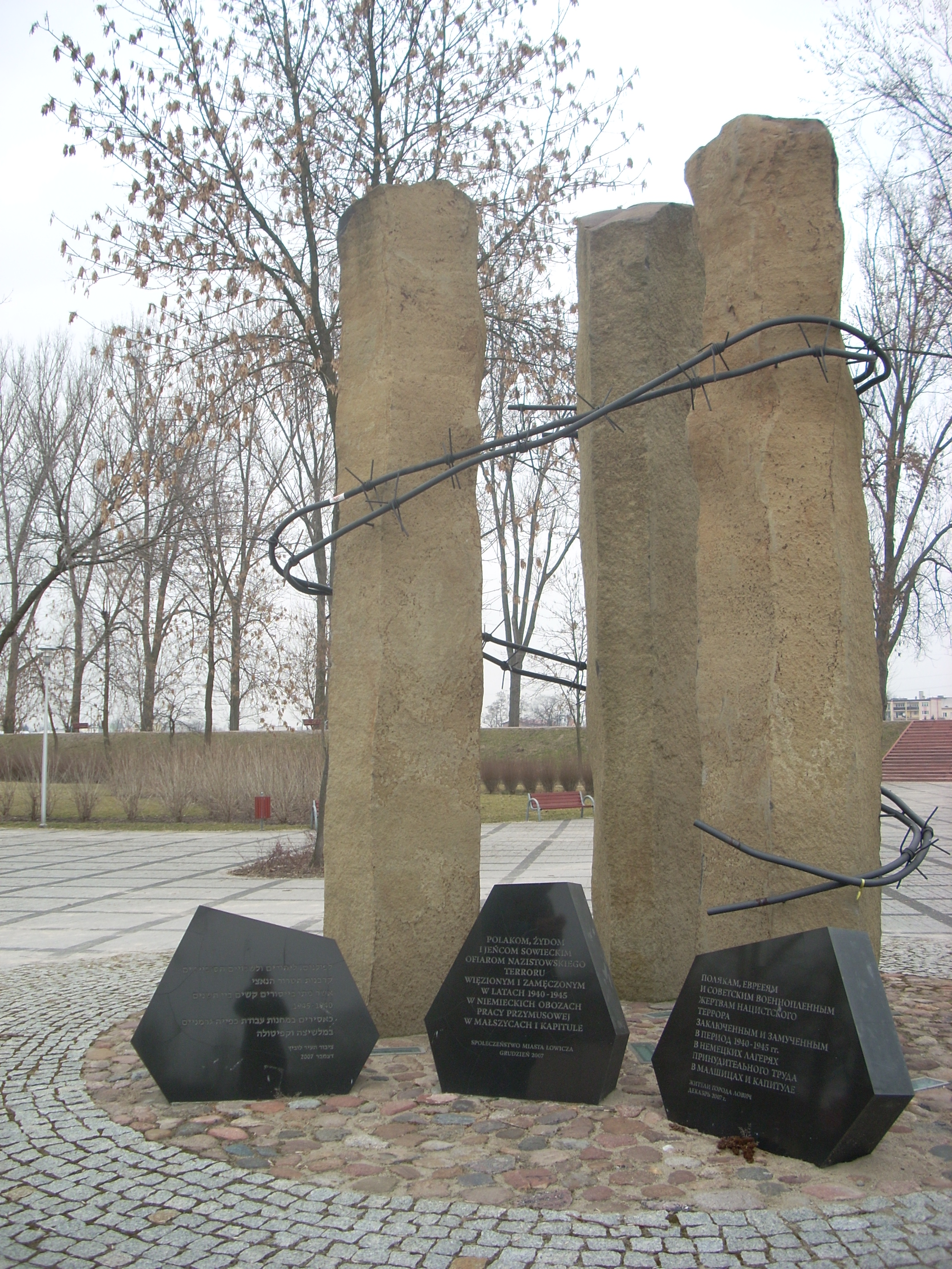 Pomnik Żydów, Polaków i jeńców radzieckich zmarłych w hitlerowskim obozie pracy w Łowiczu